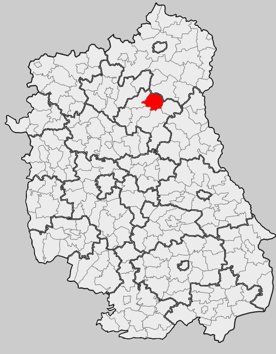 Map of gmina Jabłoń, Parczew county, Lublin voivodship Mapa gminy Jabłoń, powiat parczewski, województwo lubelskie